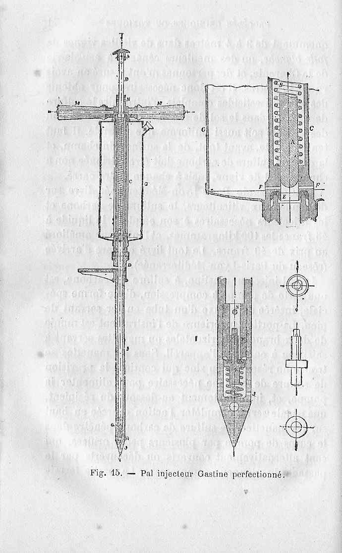 Pal injecteur Gastine, pour l'injection du sulfure de carbone dans la lutte contre le Phylloxéra